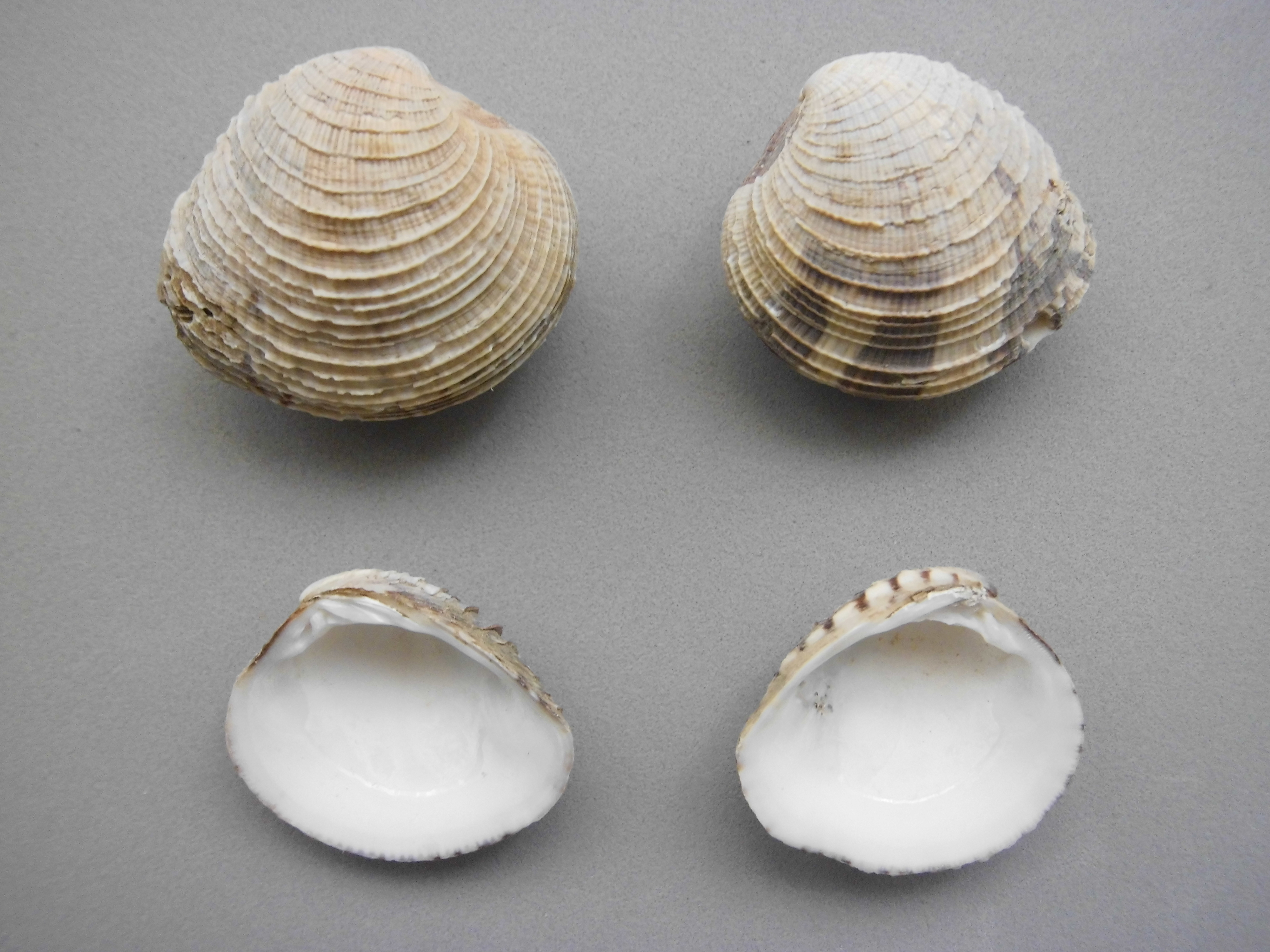 Chione cancellata (Linnaeus, 1767) colectado en 2001 en Isla Tesoro Archipiélago Las Aves (Barlovento), Dependencias Federales - Venezuela